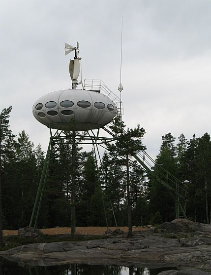 Futuro-talo Pöytyällä kansantaitelija Kyösti Iittin pihalla (koordinaatit noin Lat= 60.7503 N, Lon=22.4627 E). Lujitemuoviset Futuro-talot olivat arkkitehti Matti Suurosen suunnittelemia. Huom: Muista säilyttää viittaus kuvaajaan, mikäli käytät kuvaa.